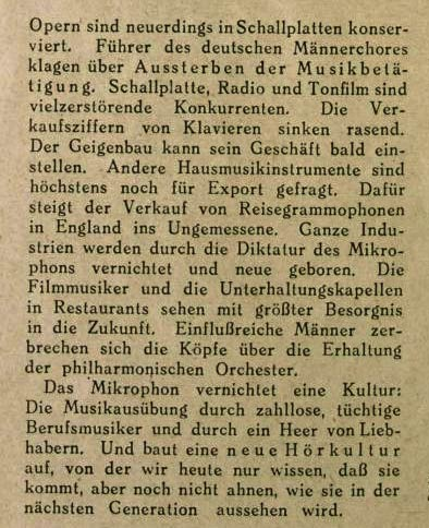 Otto Kappelmayer schreibt hier über "Die achte Großmacht Mikrophon". Er sieht in der Aufnahmetechnik einen Frontalangriff auf Personen des Musikbetriebs.